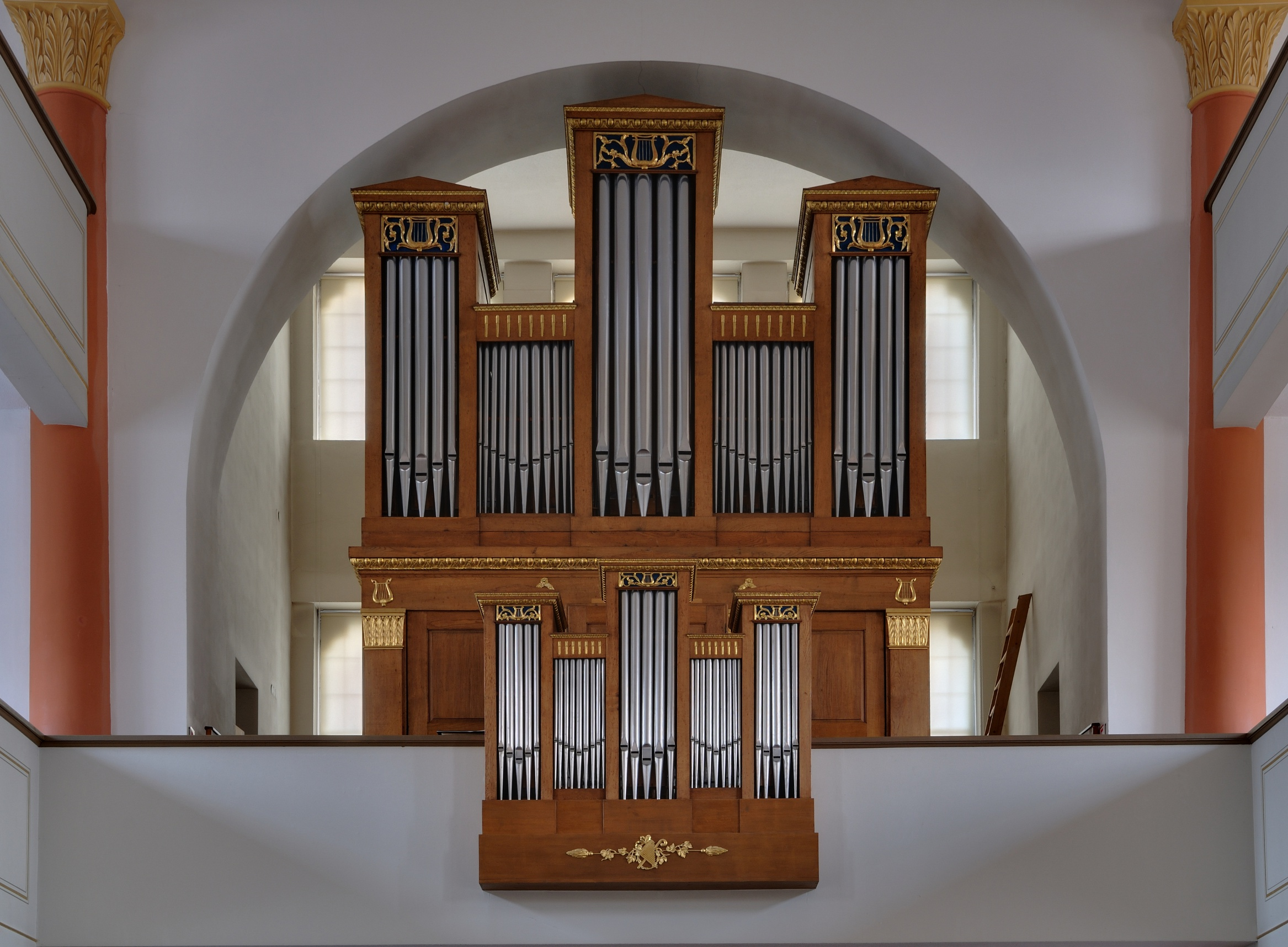 Kandern: Evangelische Kirche, Orgel